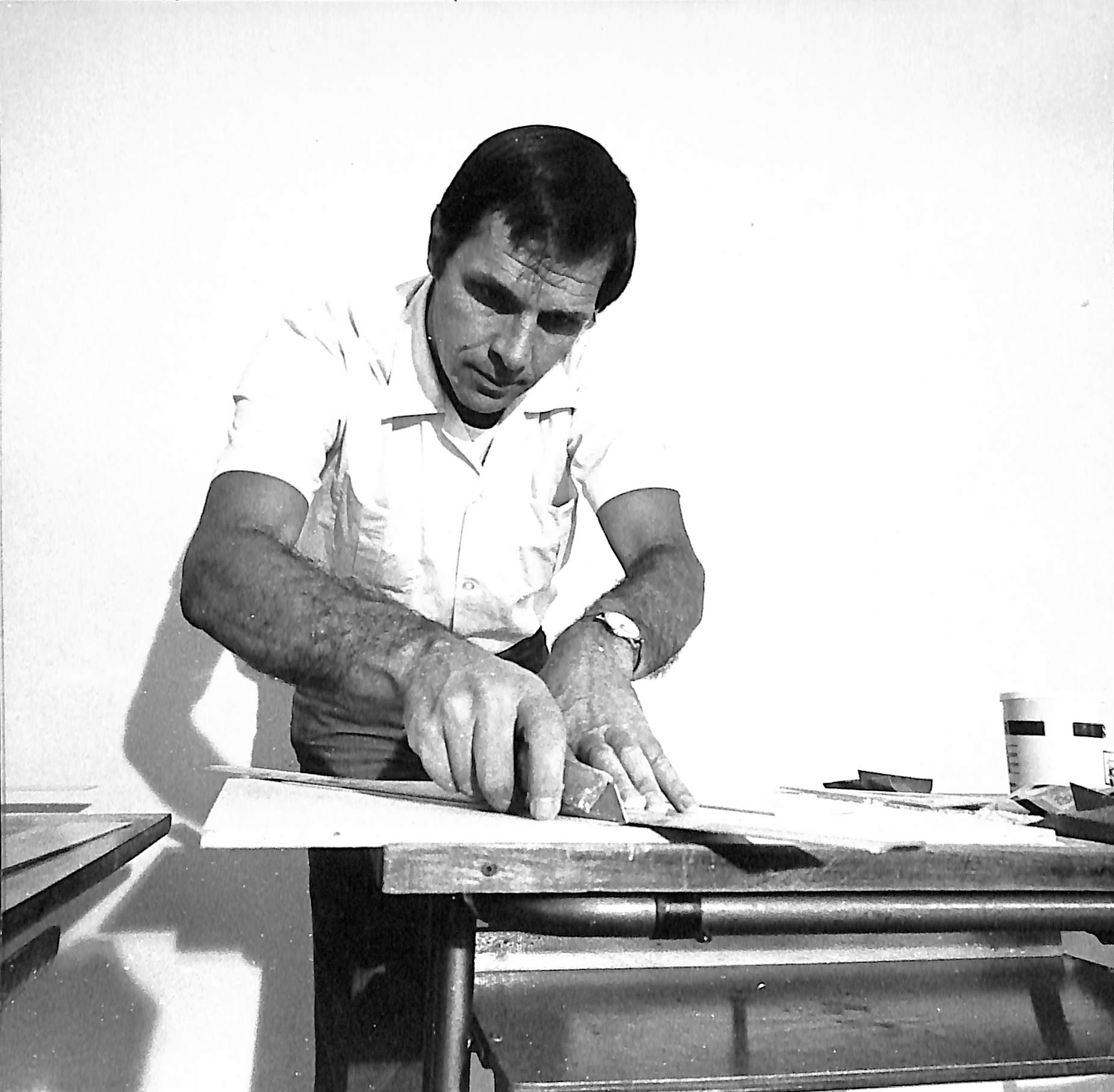 Alberto Zilocchi ad Anversa nel 1976, anno del simposio di fondazione del Centro internazionale di Studi d’Arte Costruttiva (Internationaler Arbeitskreis für Konstruktive Gestaltung)